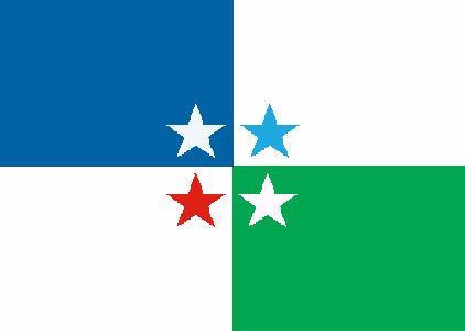 Bandera del Municipio de Avellaneda (Santa Fe, Argentina).